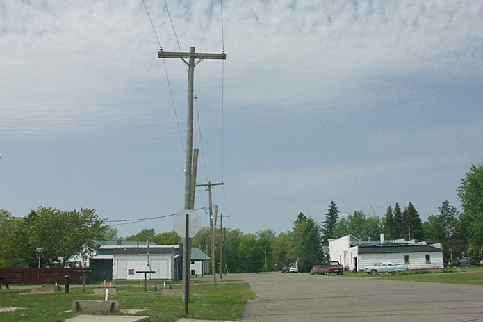 Flensburg, Minnesota. From